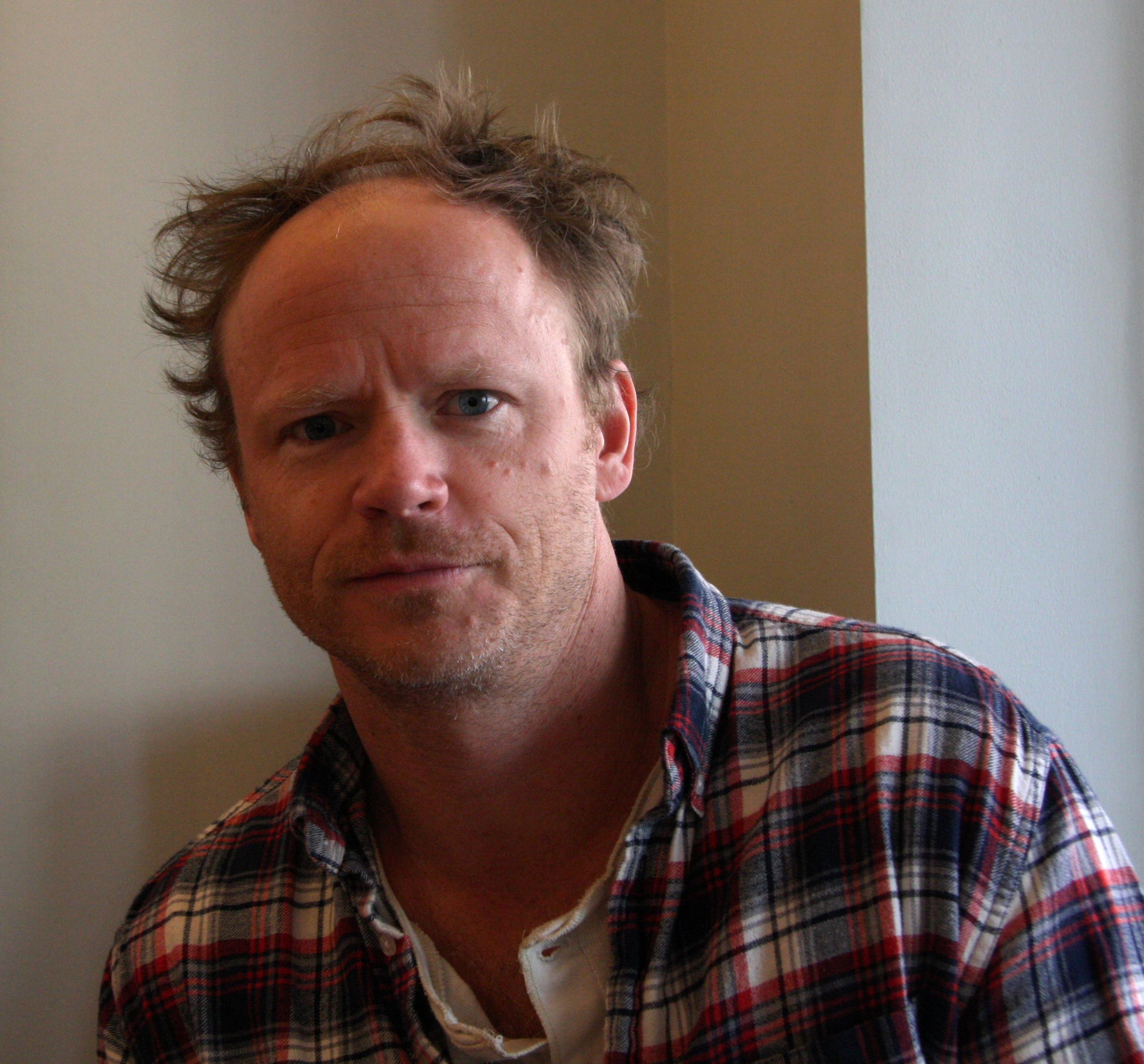 Harald Eia på boksignering i Bergen.